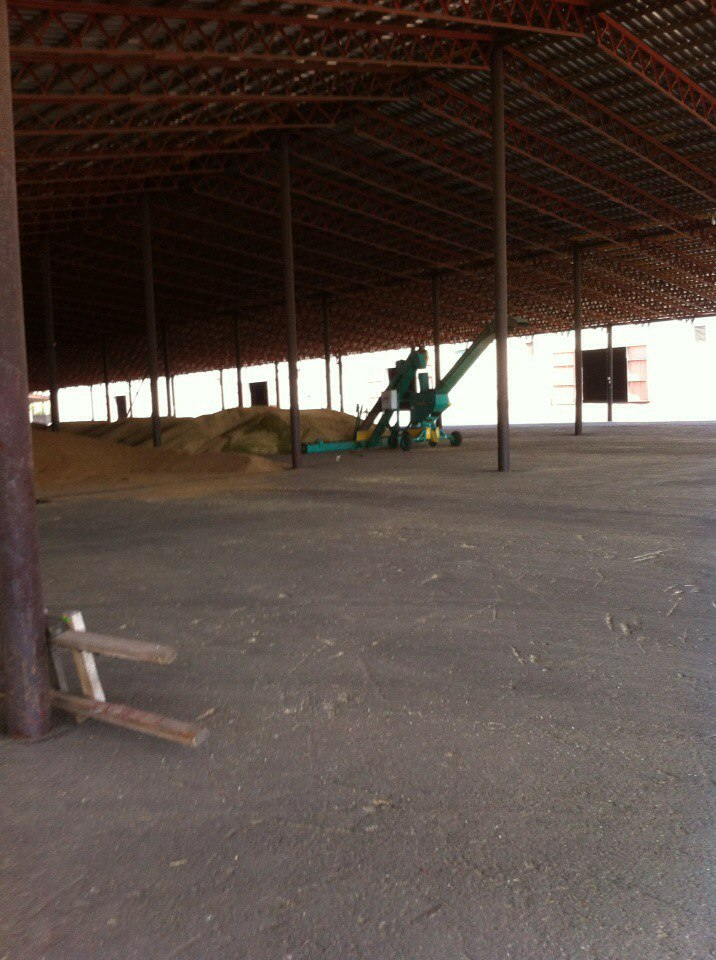 Зернометатель на току